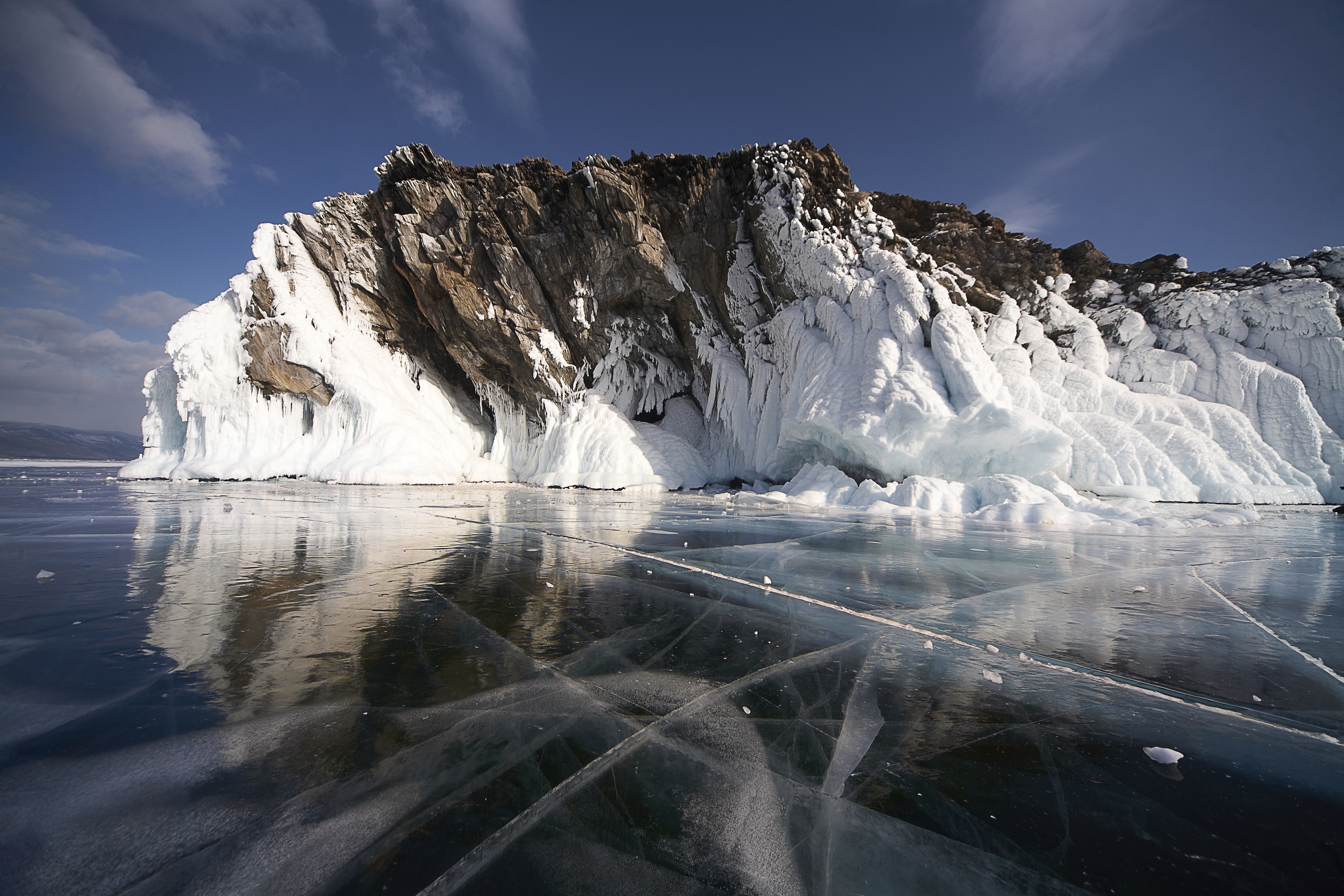 Острова пролива Малое Море на Байкале: Ольхонский район, Иркутская область This image is related to the protected area of Russia number 3810290